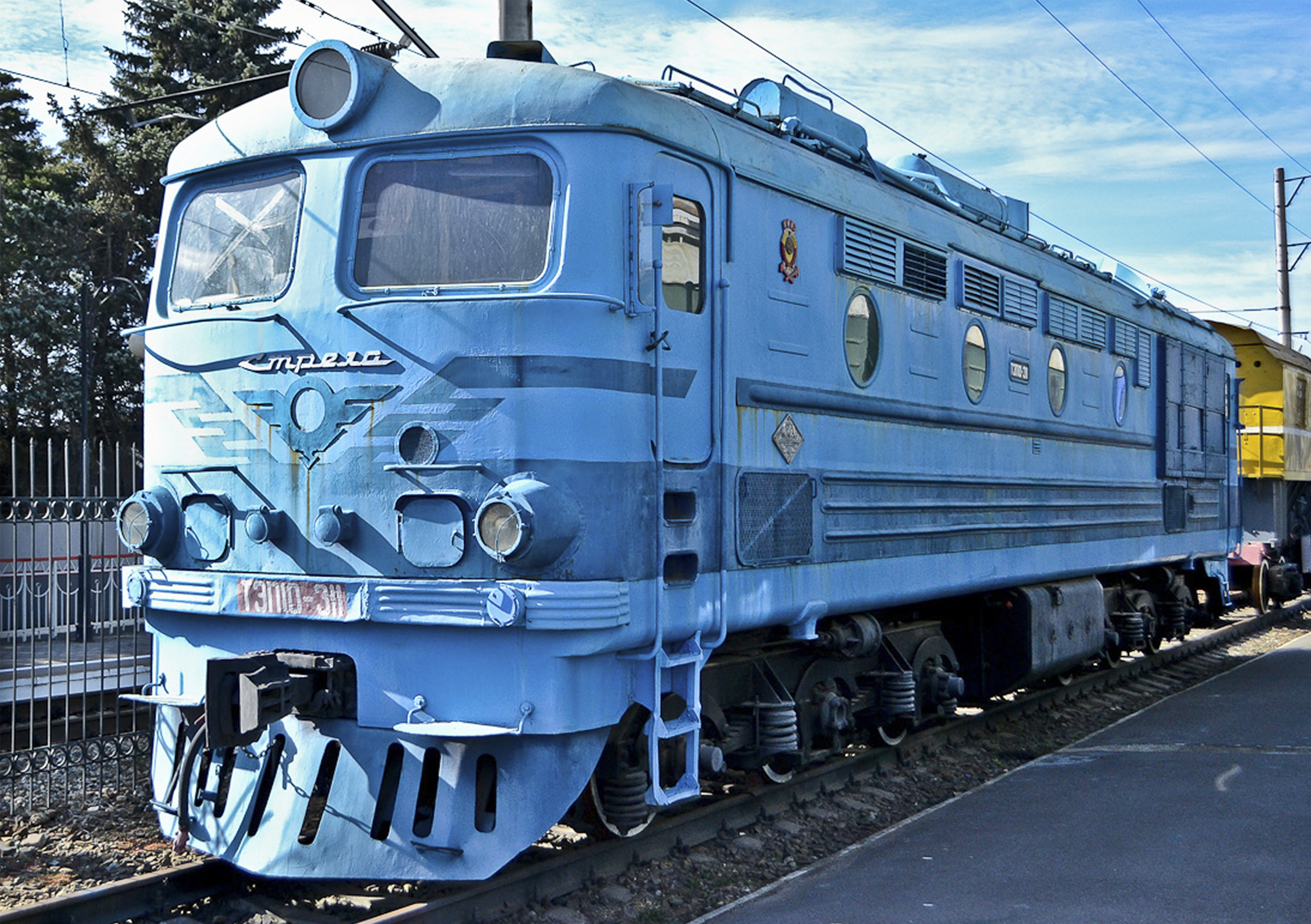 Тепловоз построен в 1967 году Харьковским машиностроительным заводом